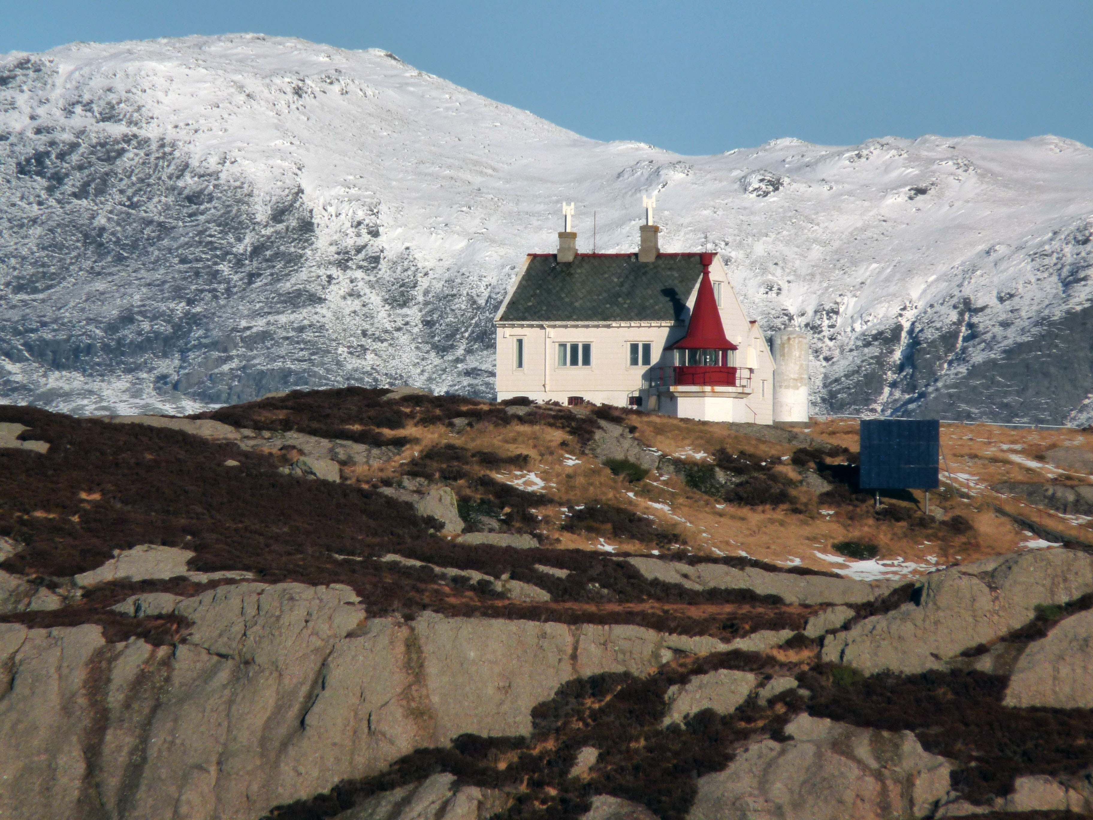 05 Geita Fyr